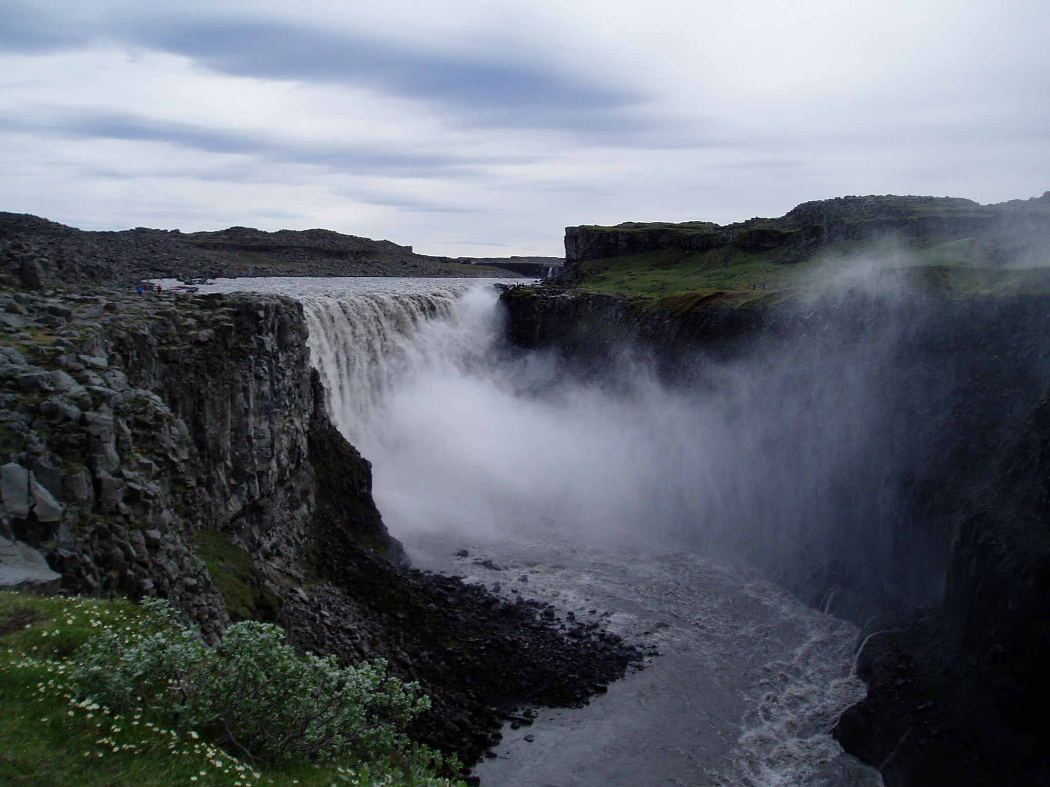 Dettifoss, Islandia 2007